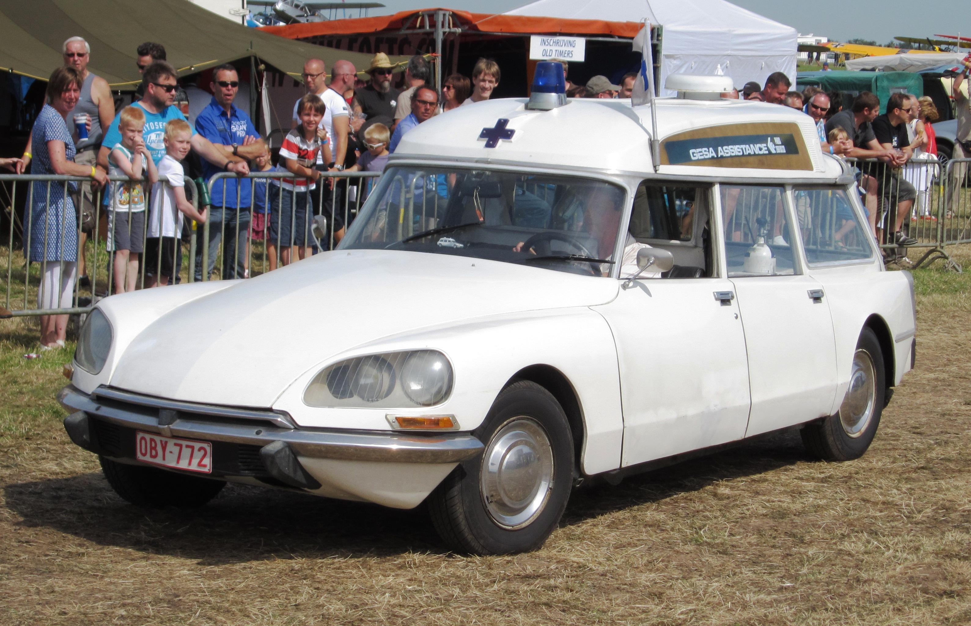 Citroen DS comme ambulance